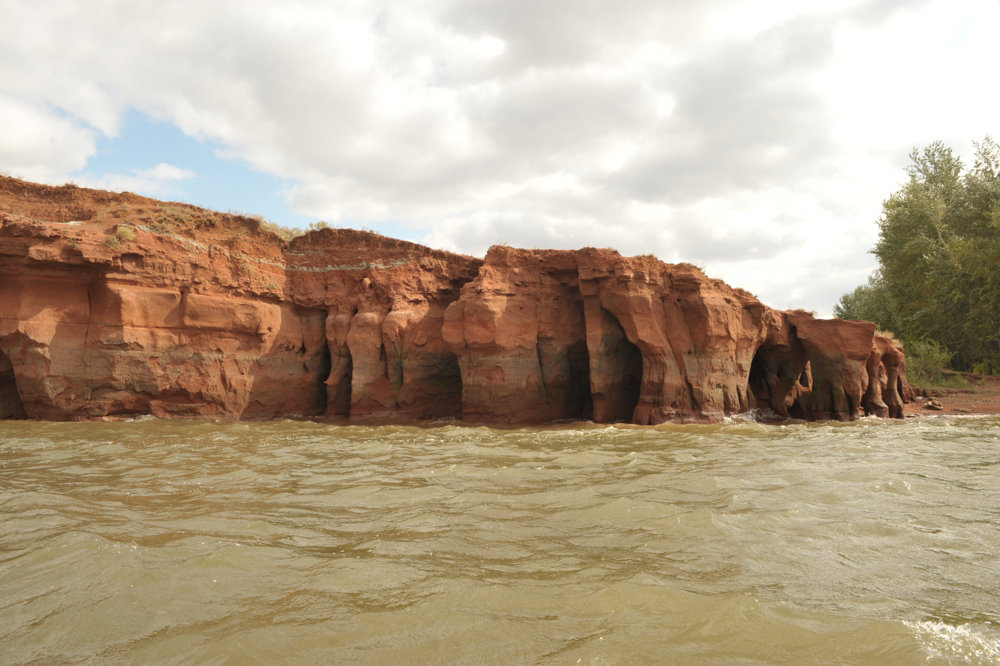 Красная круча (Красный яр), Черновское водохранилище, Илекский район, Оренбургская область This image is related to the protected area of Russia number 5610073